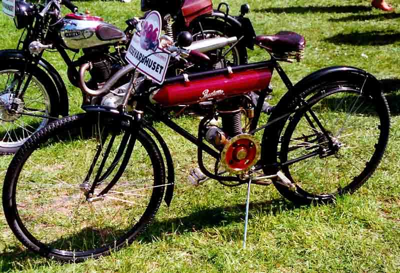 Phantom 185 1920